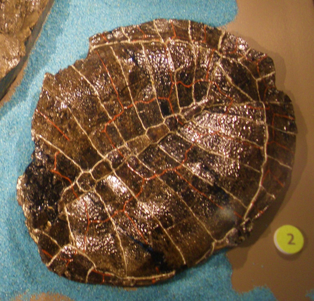 Fossil of Peltochelys, an extinct turtle Took the photo at Musee d'Histoire Naturelle, Brussels